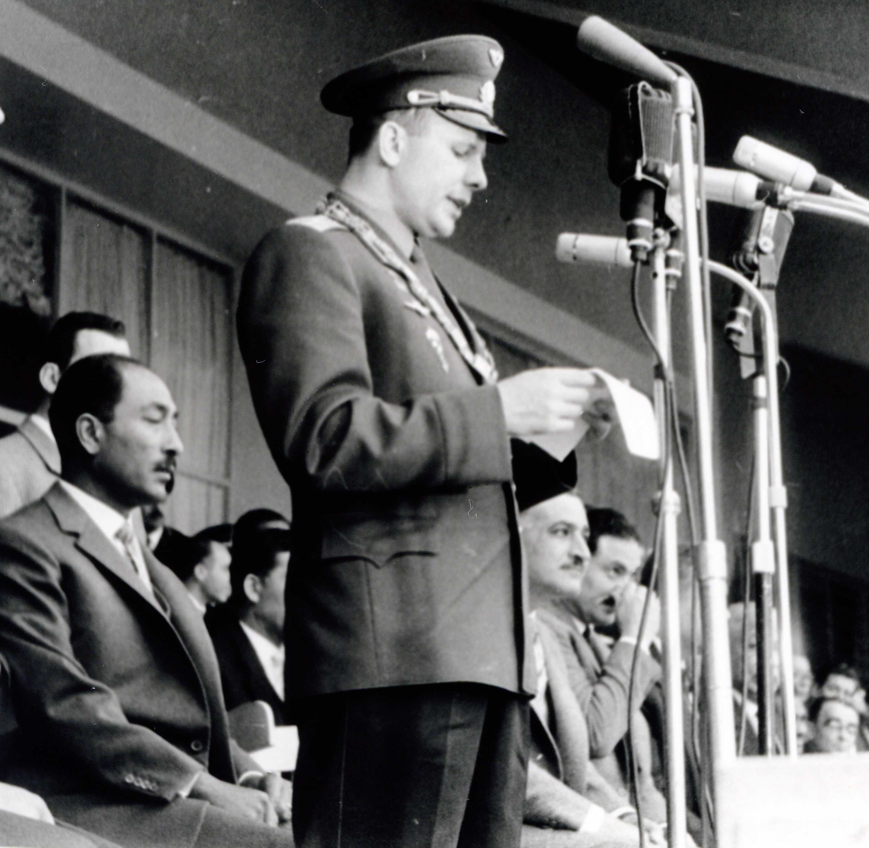 Yuri Gagarin(يوري جاجارين), Gamal Abdel Nasser, Anwar El Sadat, Stadium in Cairo, Egypt, 01-02-1962